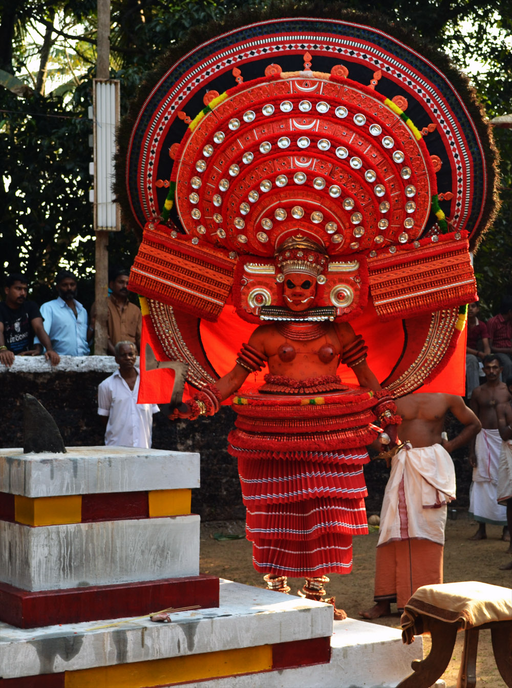 പുള്ളിക്കരിങ്കാളി